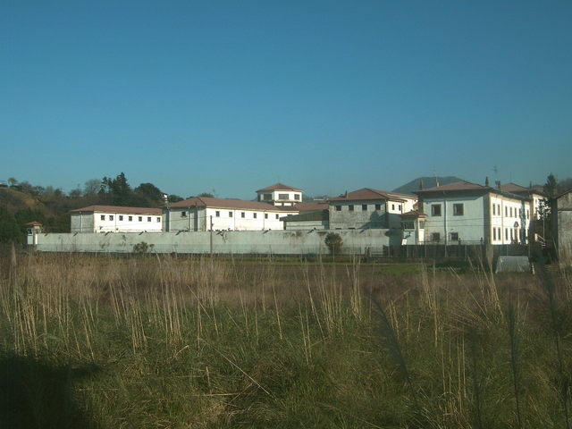 Carcel de Martutene. Situada entre los barrios de Loiola (Txomin Enea) y Martutene, situada en la ribera del Urumea, esta húmeda y obsoleta carcel con capacidad para 150 reclusos (en la actualidad hay 320) tiene los días contados, ya que se prevee que en los próxios años sea traslada al barrio de Zubieta, en su lugar se edificará las casas del Nuevo Txomin.